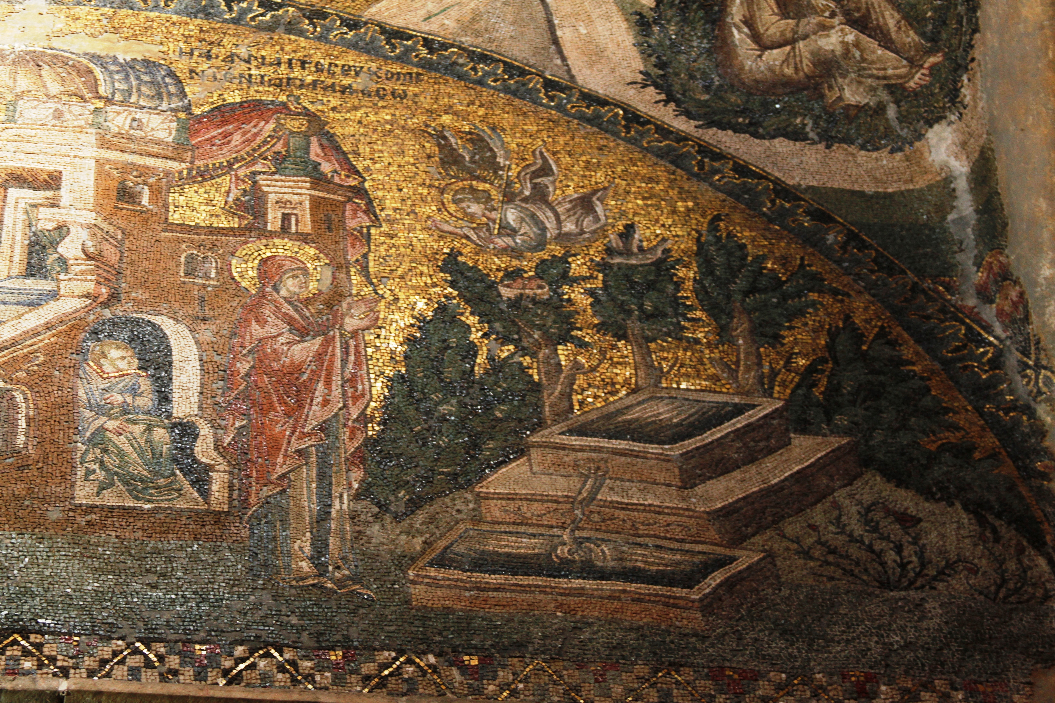 Anúncio do nascimento de Maria para Santa Ana.